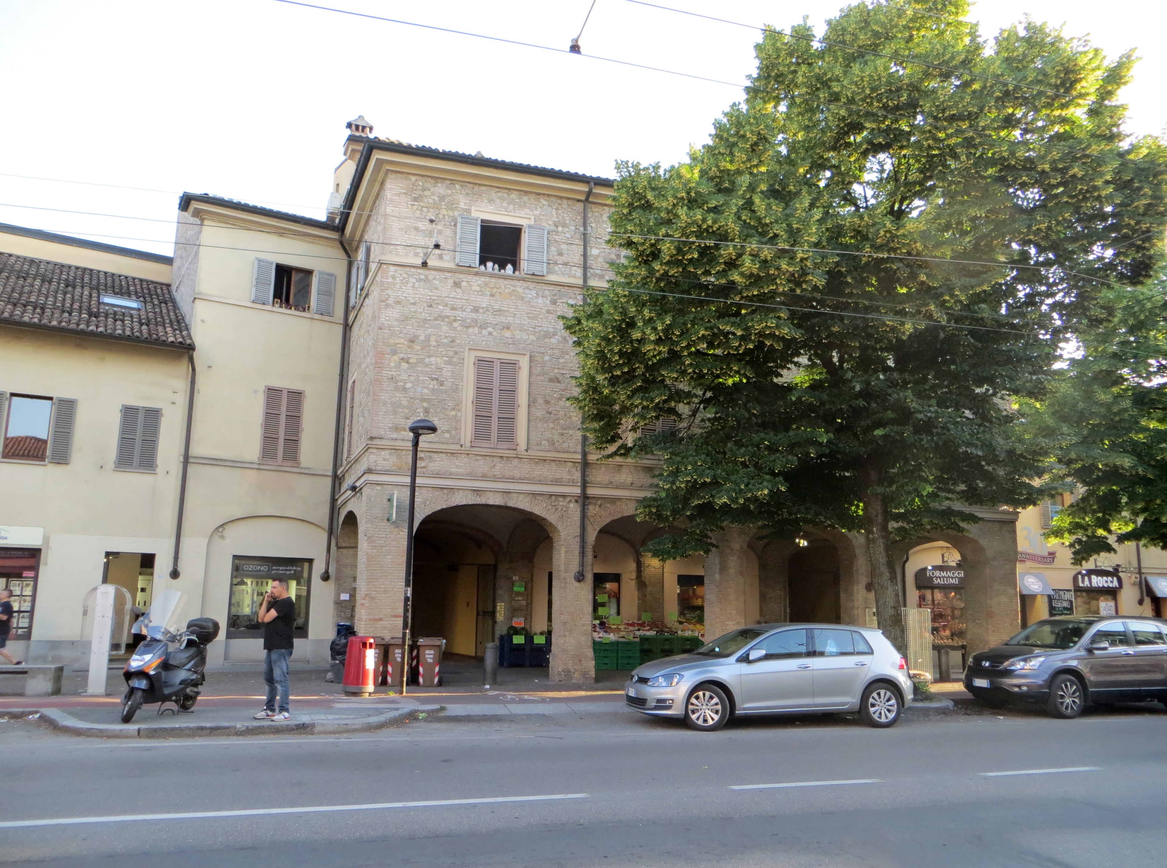 Rocca di San Lazzaro (Parma) - facciata sulla via Emilia